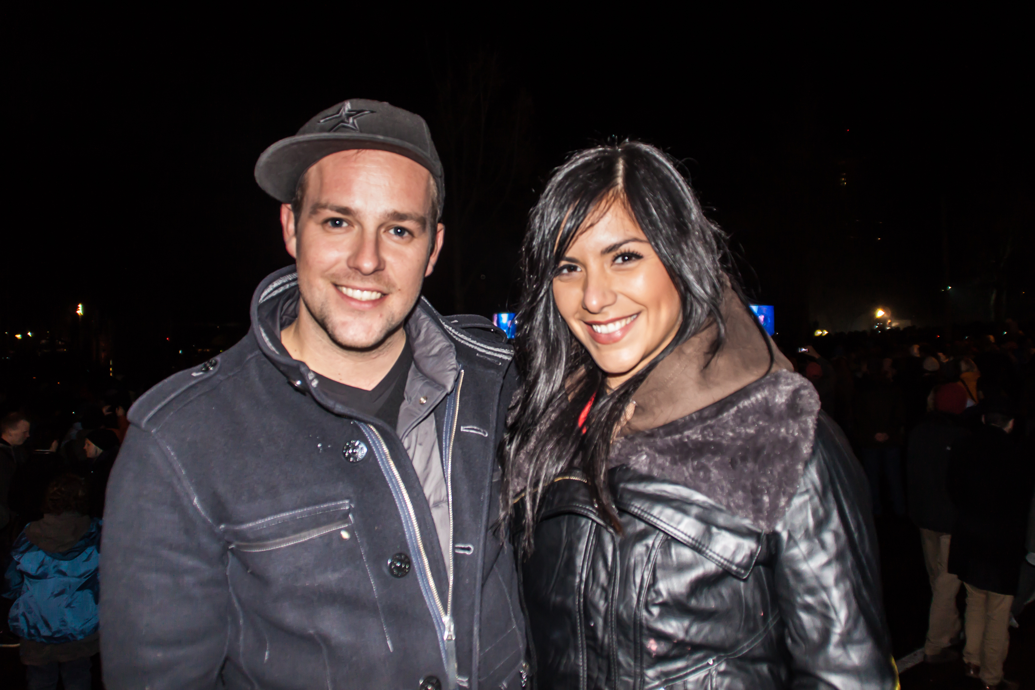 Jessica Lange und Ben bei Rock gegen Rechts im Dezember 2011 in Jena